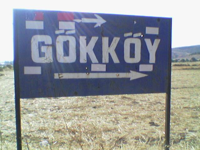 Balıkesir Merkze Gökköy Köyü giriş tabelası